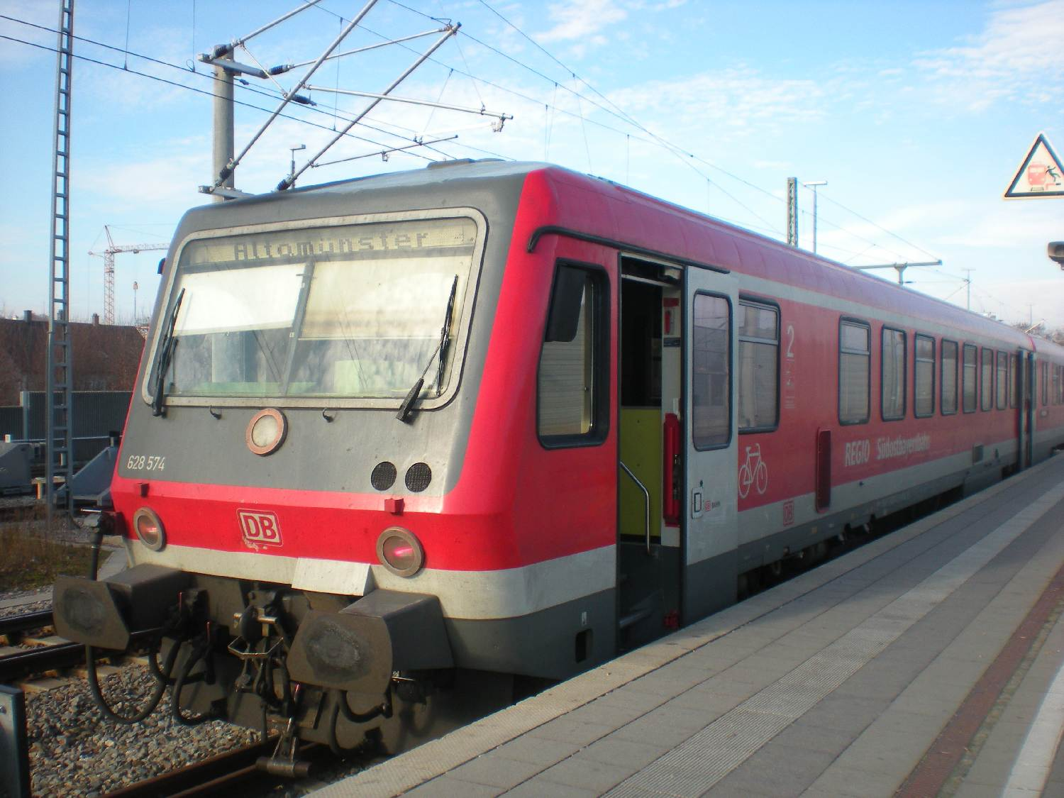 Zug der S-Bahnlinie A am Dachauer Bahnhof